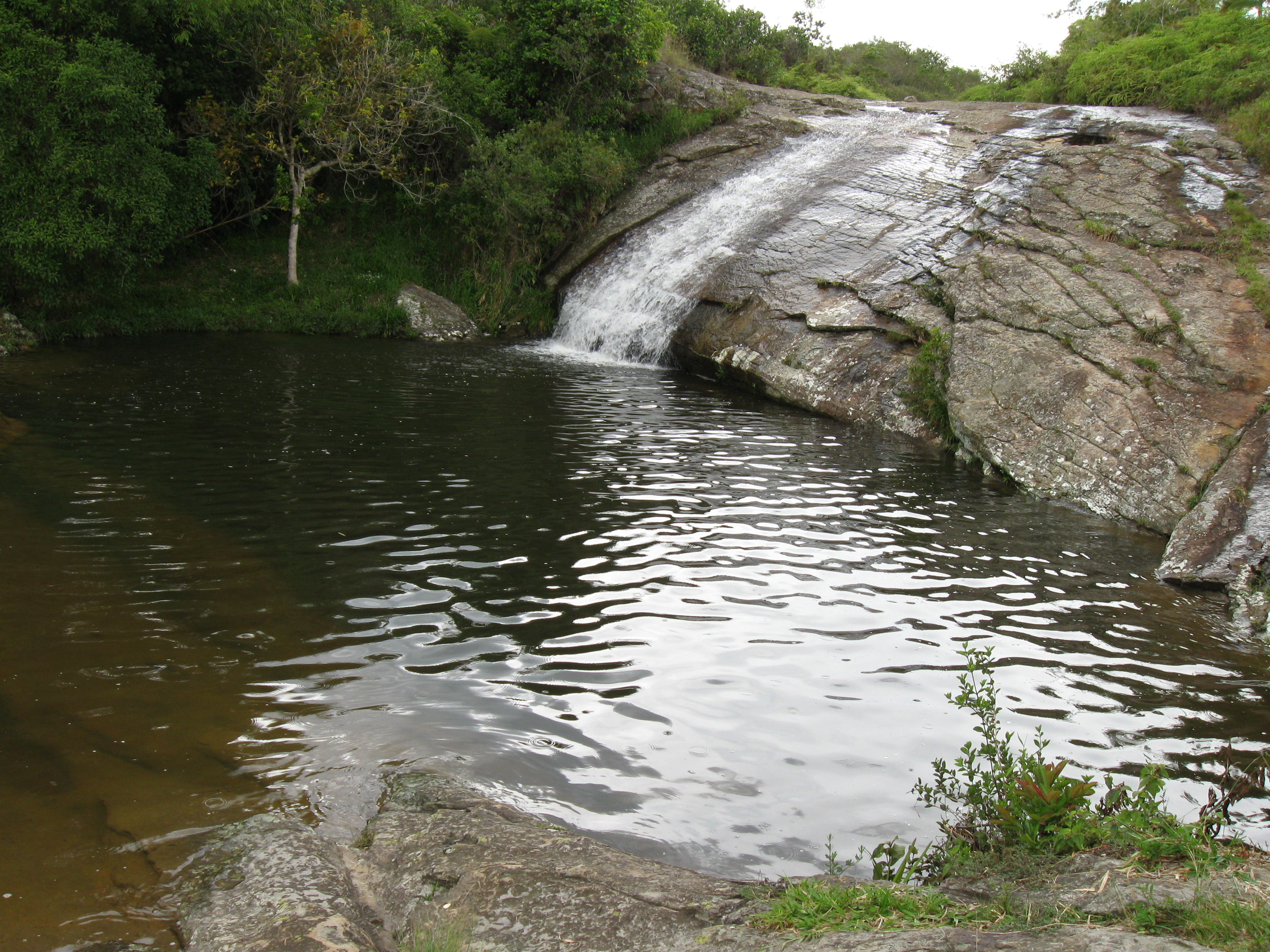 Pozo de la Gloria, Guadapule, Santander, Colombia